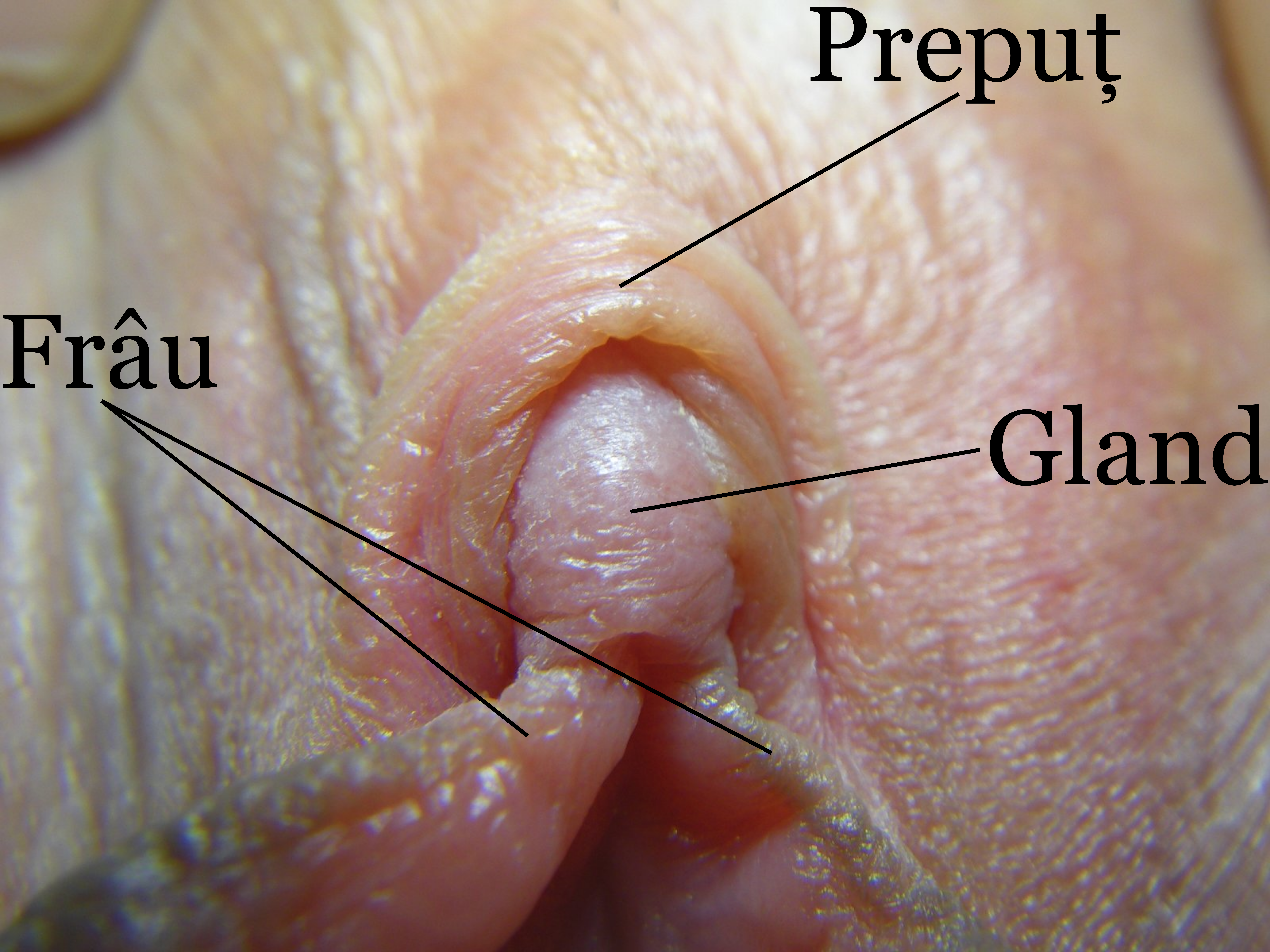 Structura glandului clitoridian